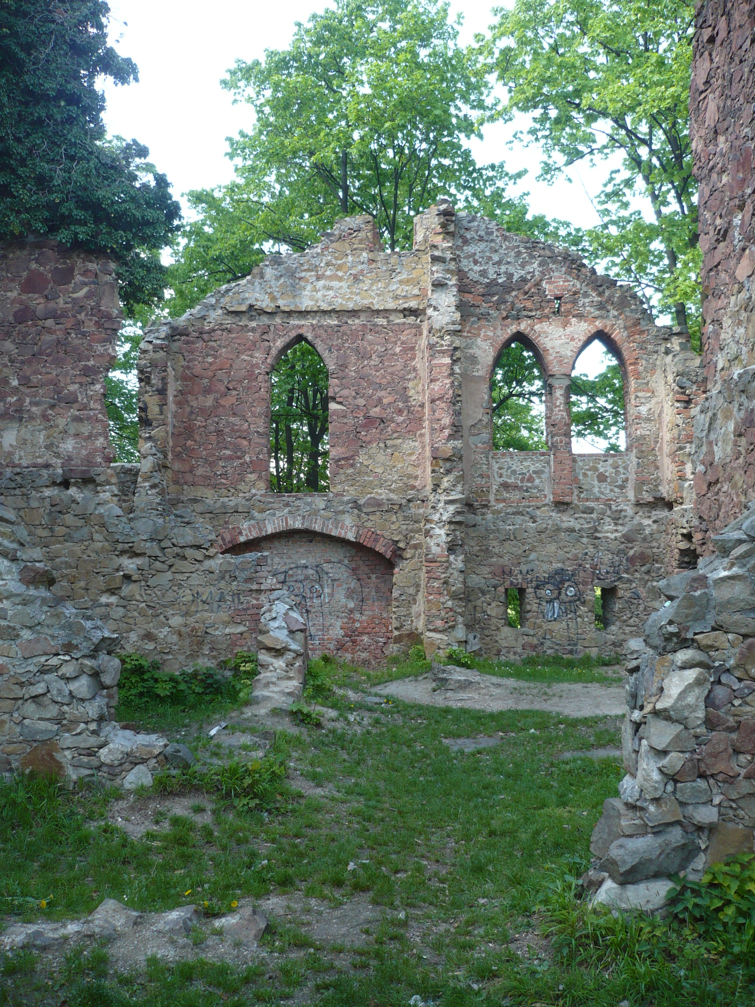 Stary Książ